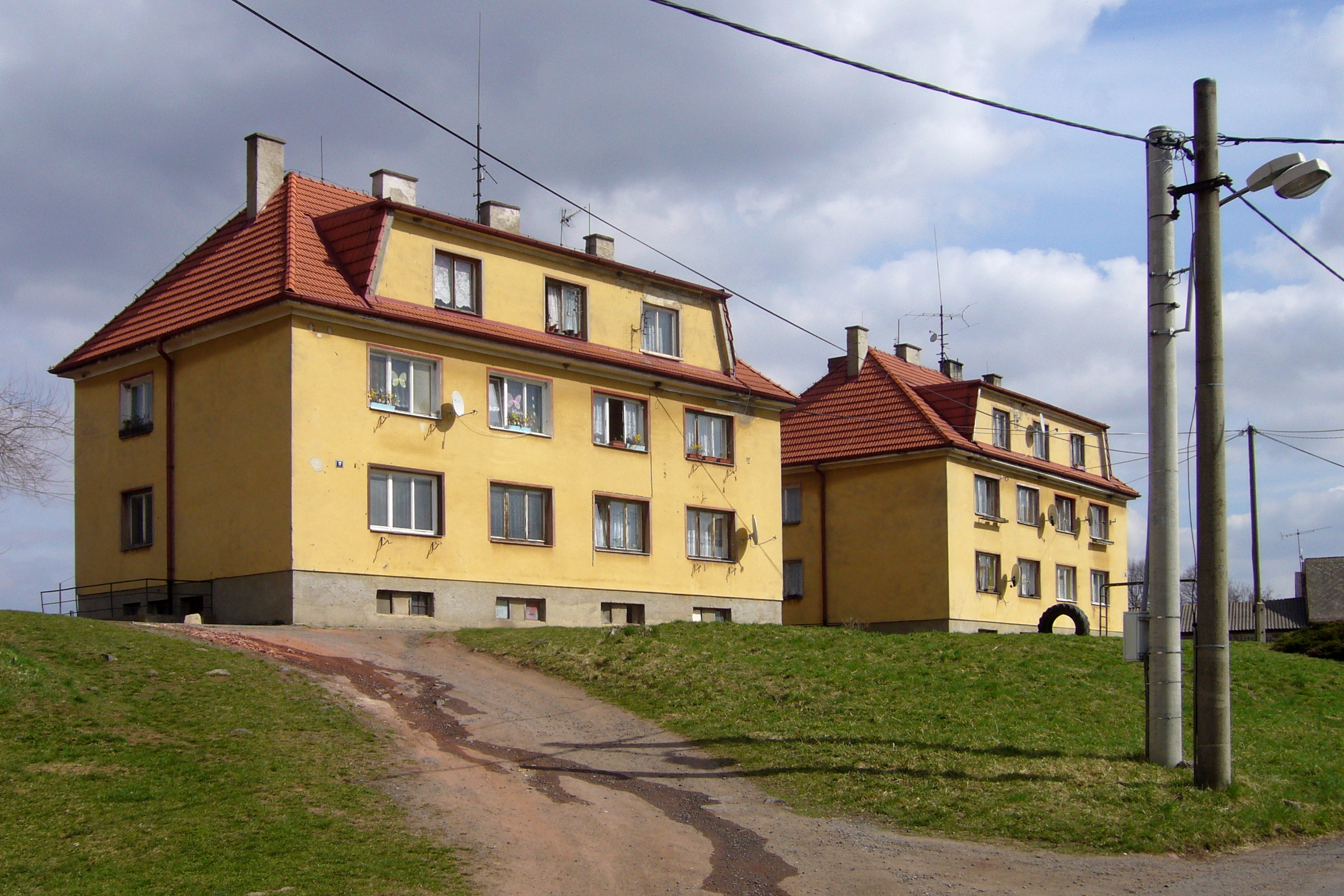 Bytové domy